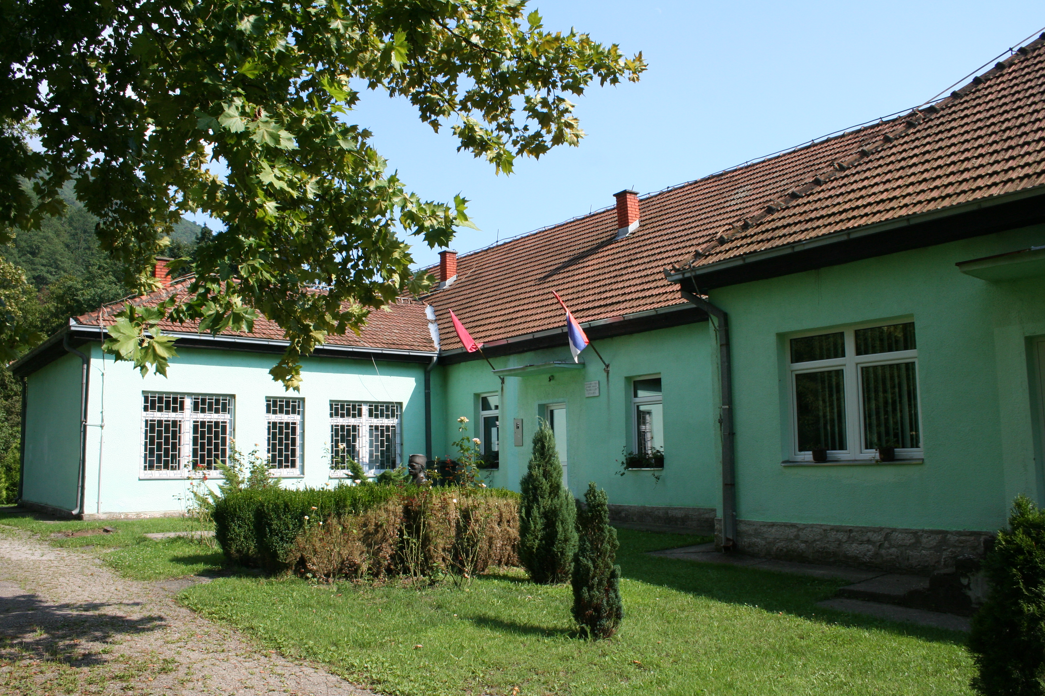 Osnovna škola "Miloš Gajić" u Amajiću